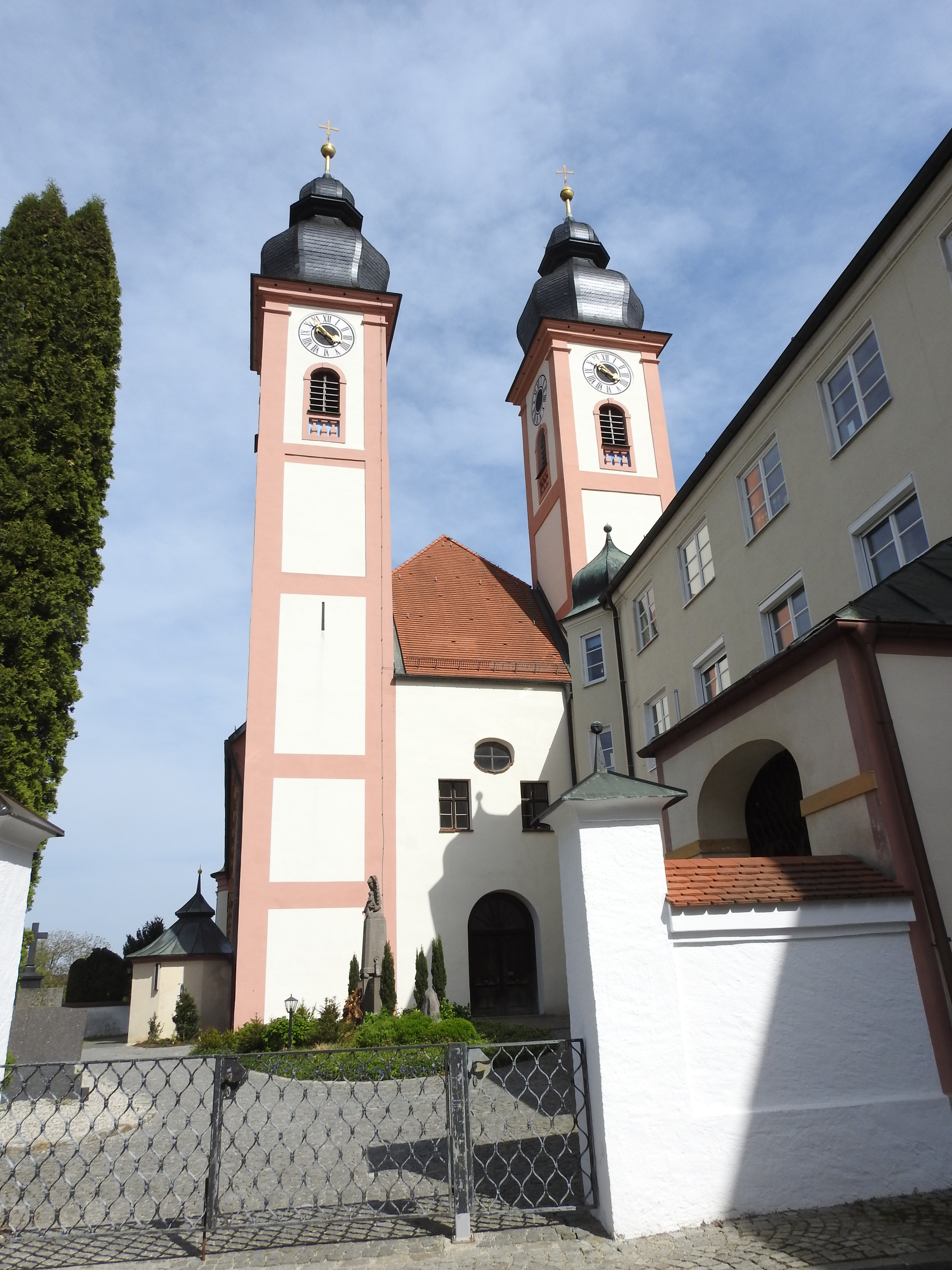 Klosterkirche Au am Inn, Gars am Inn